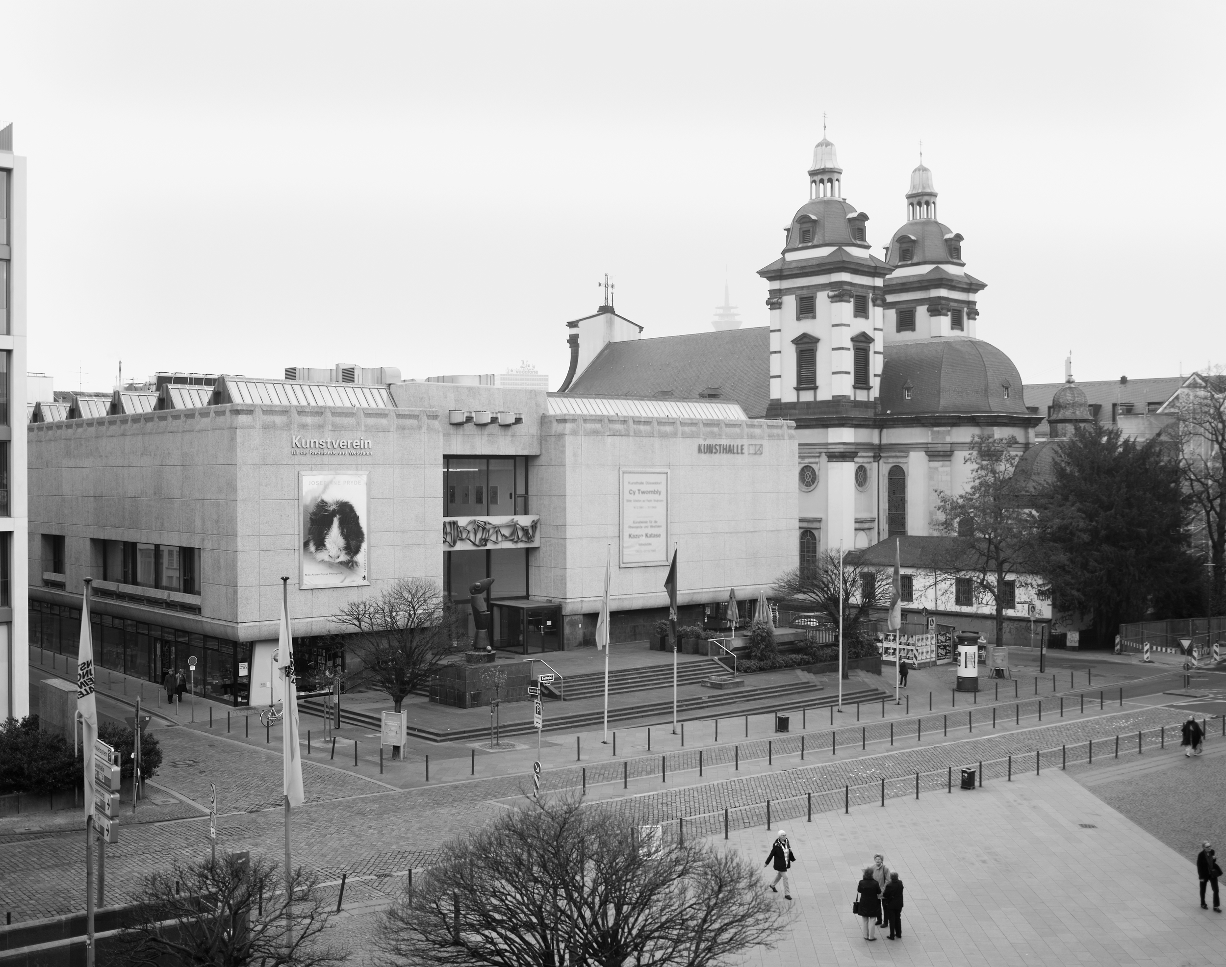 Aussenansicht der Kunsthalle Düsseldorf, vom Kaffee der Kunstsammlung fotografiert. Bild entstammt dem künstlerischen Werk des Autors und wurde in der Ausstellung "We aren't mussican" im Kunstverein Düsseldorf" Juli - September 2012 gezeigt.